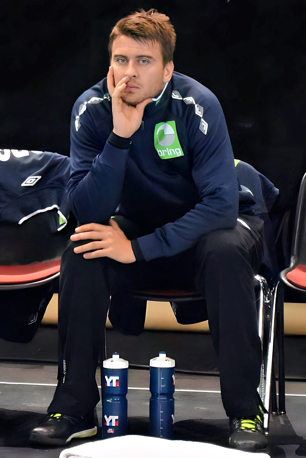 Le 10 janvier 2016 lors du match Norvège / Qatar durant la Golden League à l'AccordHotel Arena (Paris). Ole Erevik